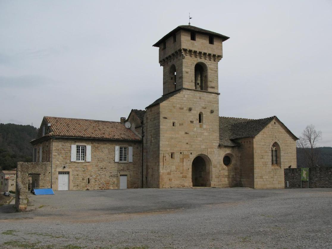 Village de : Les salelles (Ardèche)